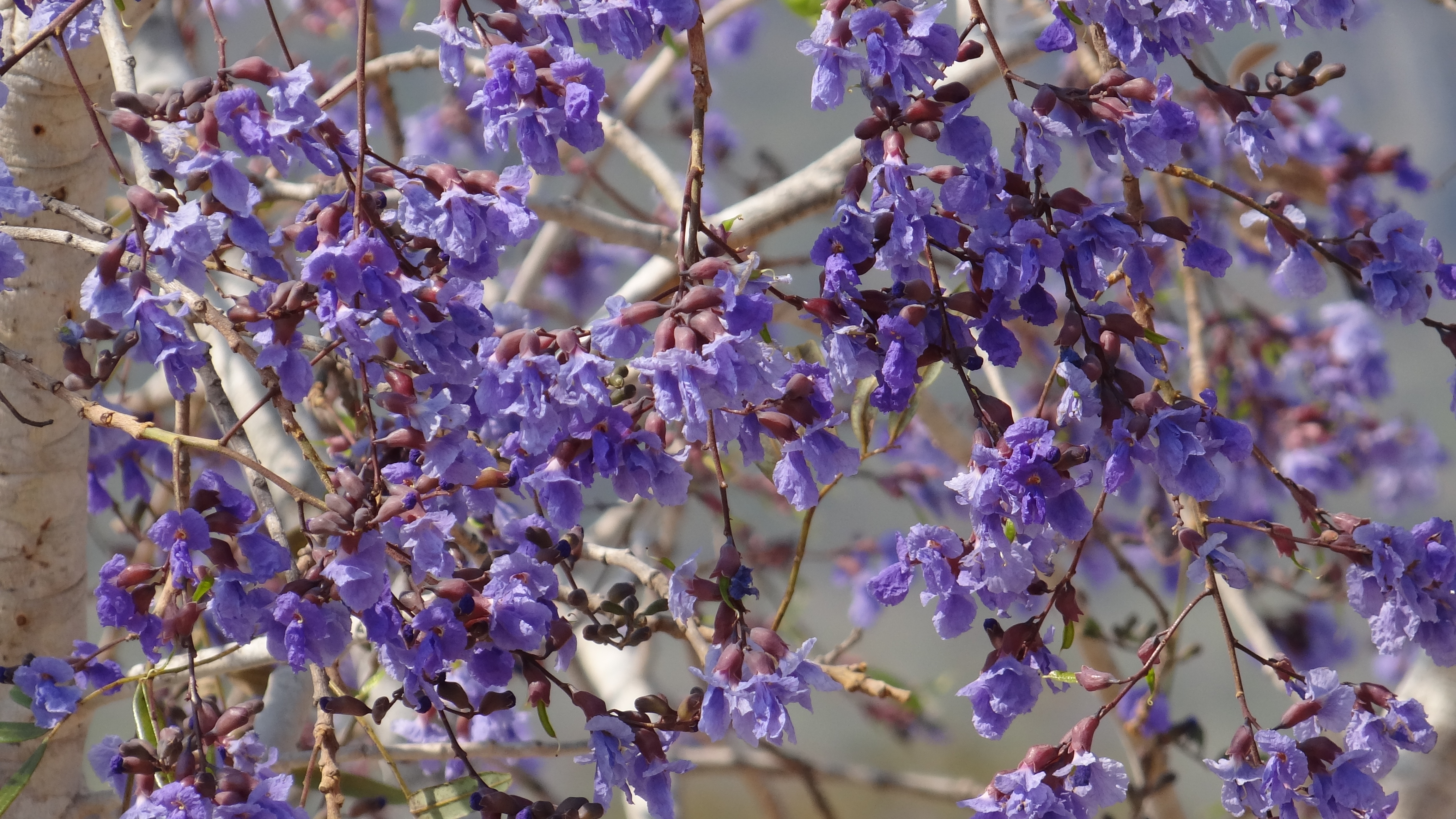 flores de sucupira preta